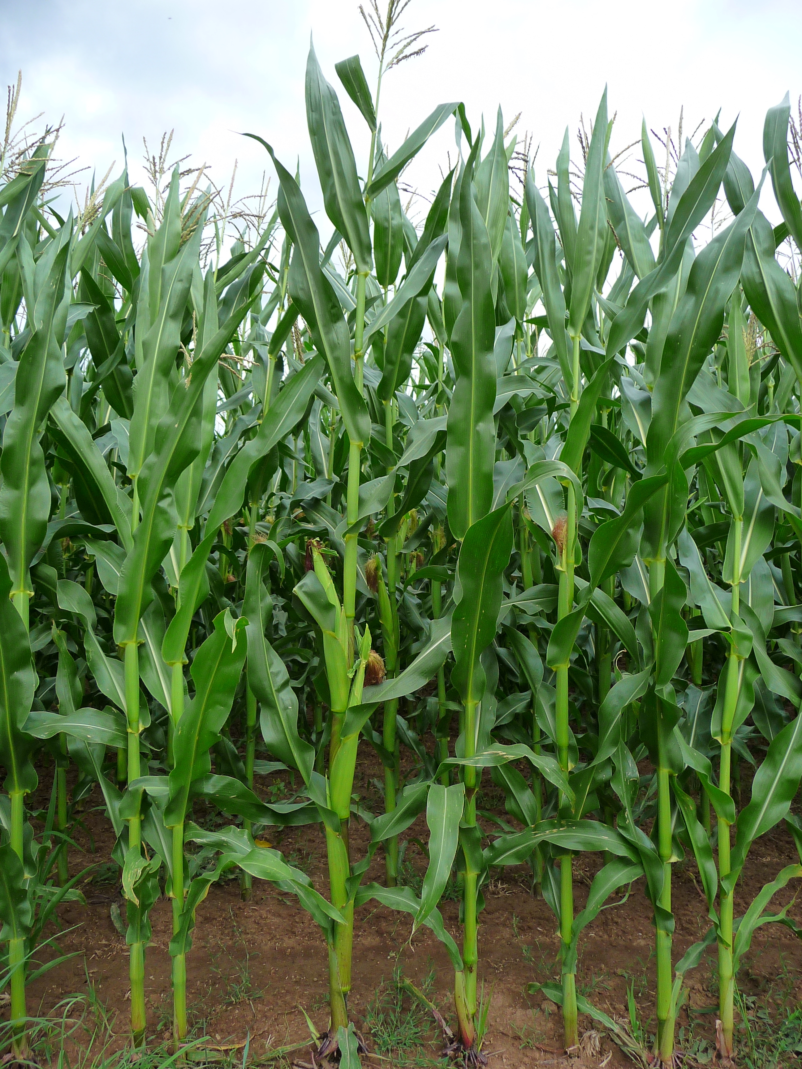 Blick auf ein Maisfeld (Zea mays); gut erkennbar sind die männlichen Blütenstände